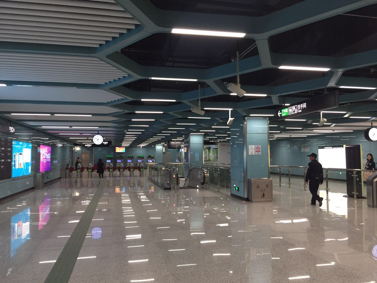 广州地铁钟村站